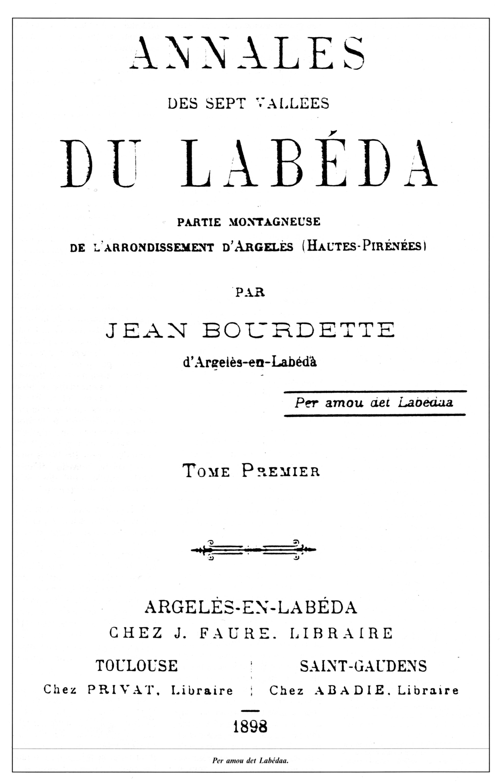 Couverture du tome 1er des "Annales des Sept Vallées du Labéda, partie montagneuse de l'arrondissement d'Argeles (Hautes Pyrénées)" publié par Jean Bourdette en 1898, historien du Lavedan, per amou det Labédaa (par amour du Lavedan)